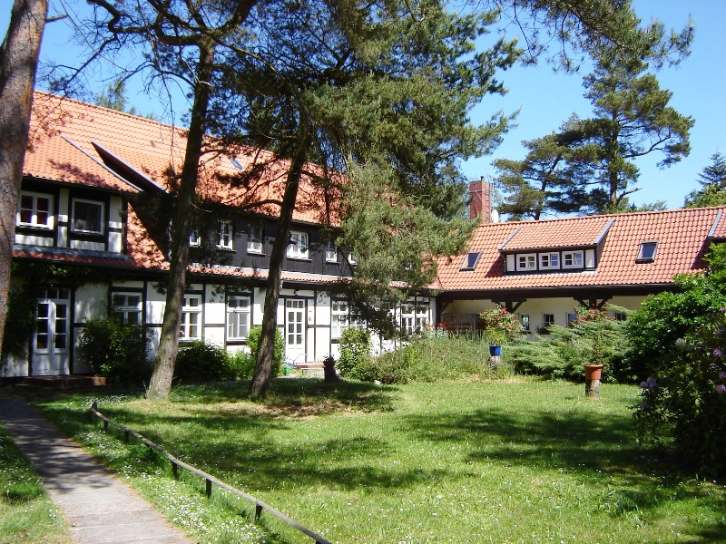 Zingsthof 2008, Zingst (Mecklenburg-Vorpommern)